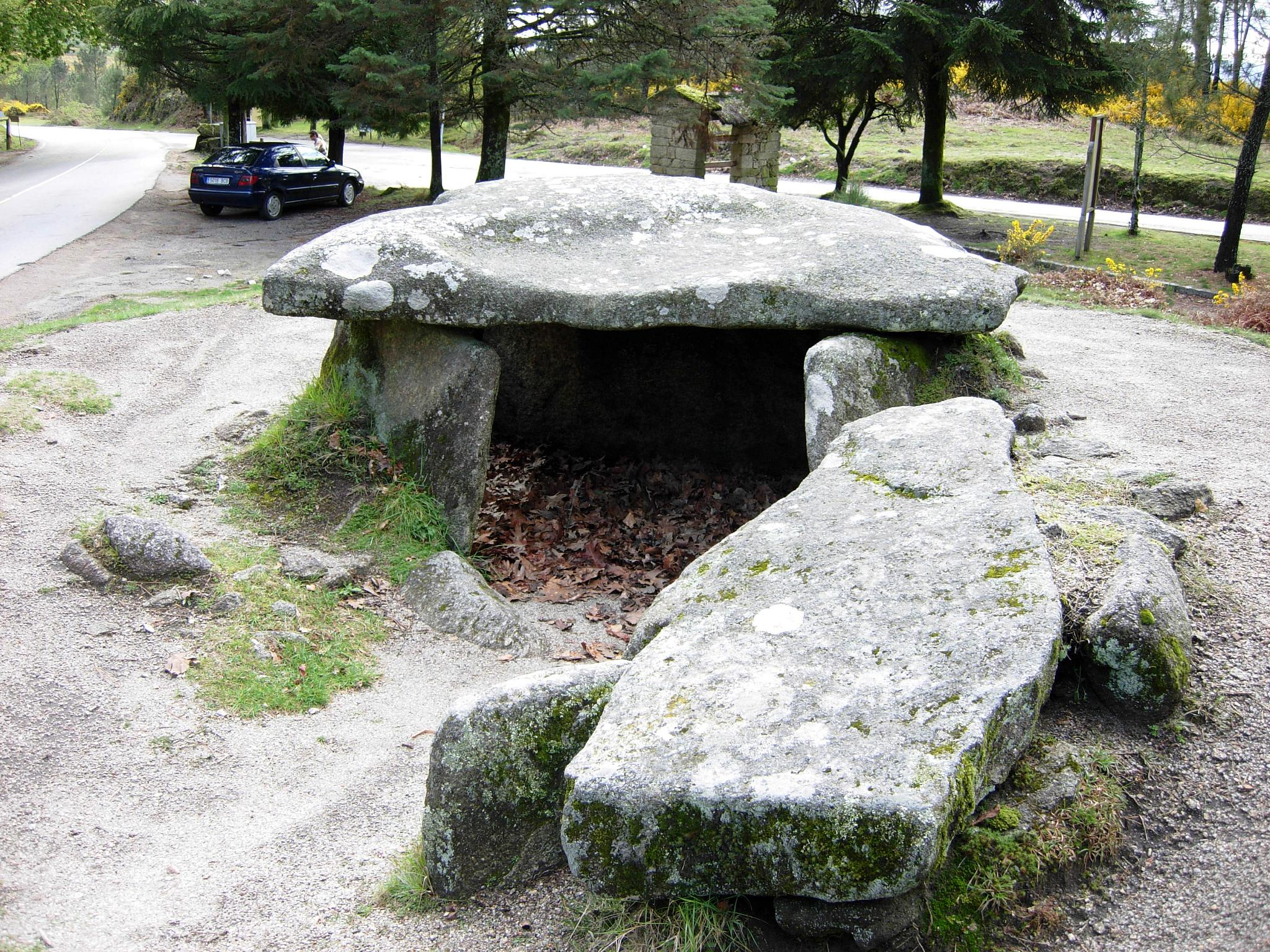 Esta foto participó en el juego En un lugar de Flickr.